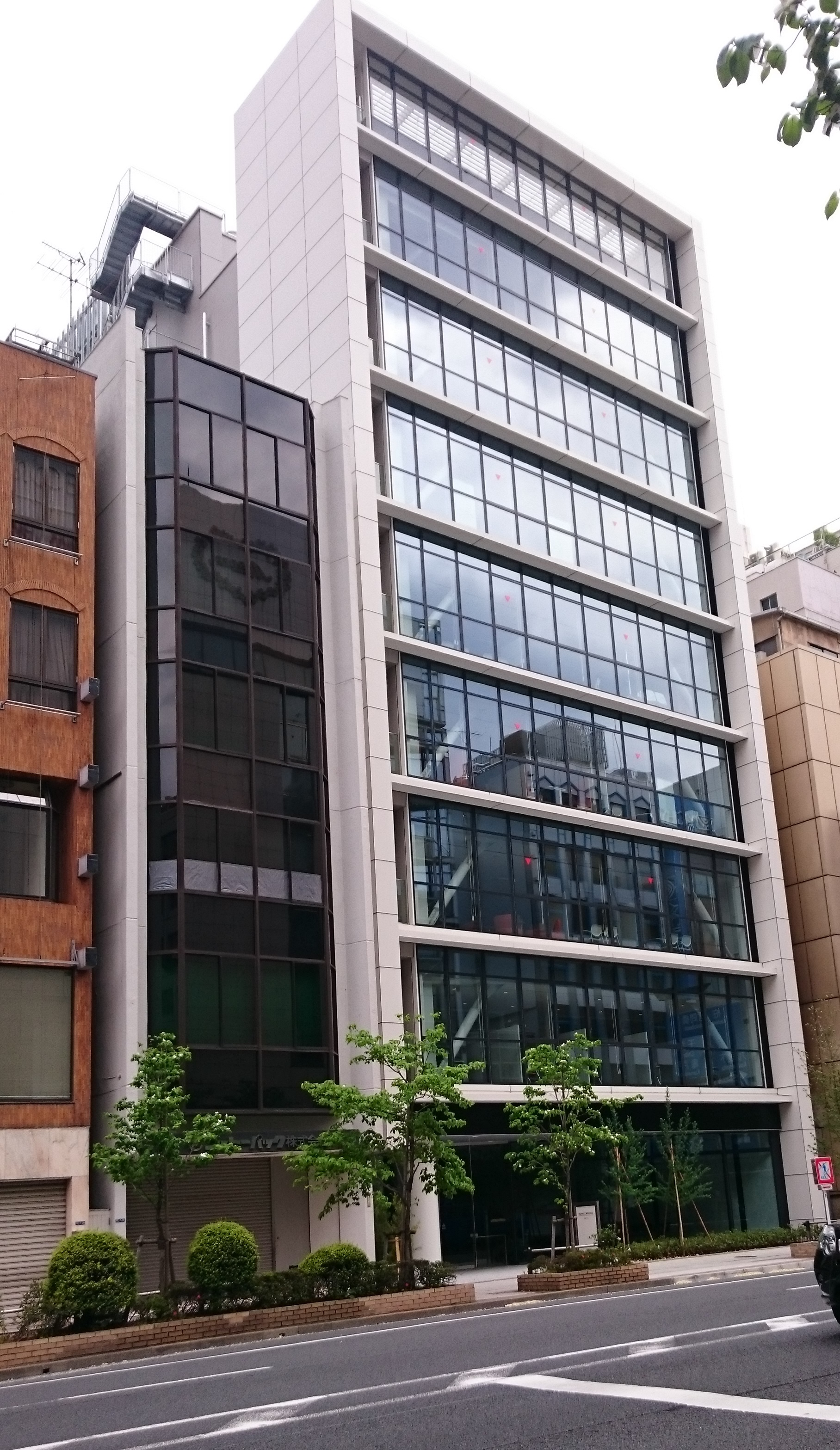 大日精化工業株式会社 本社ビル